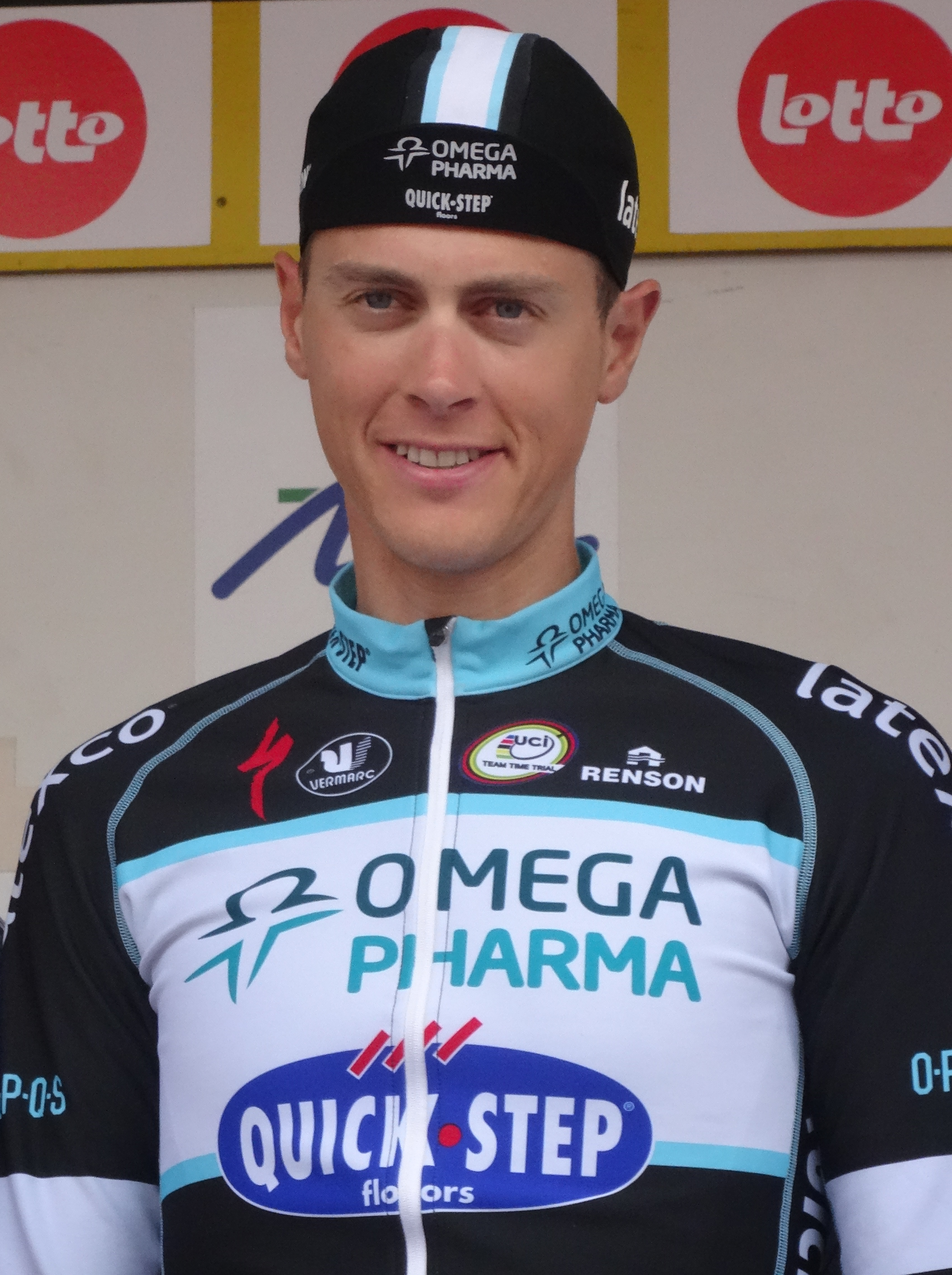 Reportage photographique réalisé le octobre à l'occasion de l'arrivée de la première étape de l'Eurométropole Tour 2014 à Bissegem (Courtrai), Belgique.